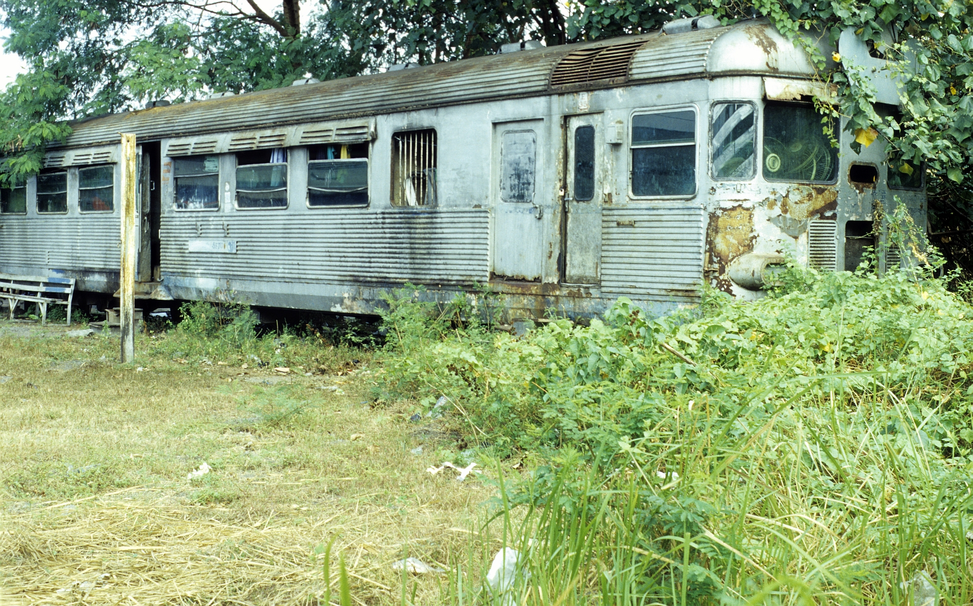 PTKA MCDW 300 (A)